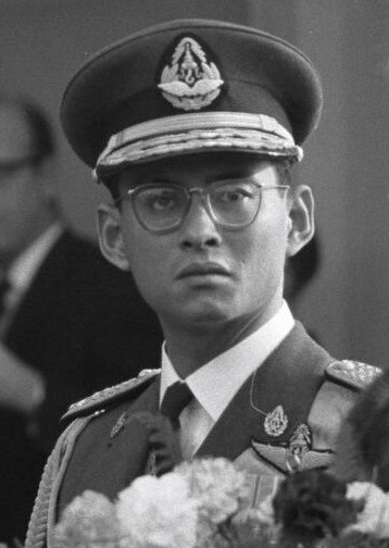 Aankomst Koning Bhumibol en Koningin Sirikit te Den Haag, Koning Bhumibol - Location: Den Haag, Zuid-Holland